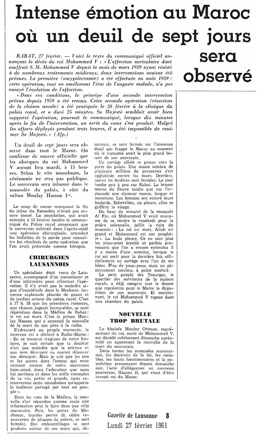 Gazette de Lausanne du lundi 27 février 1961, page 8